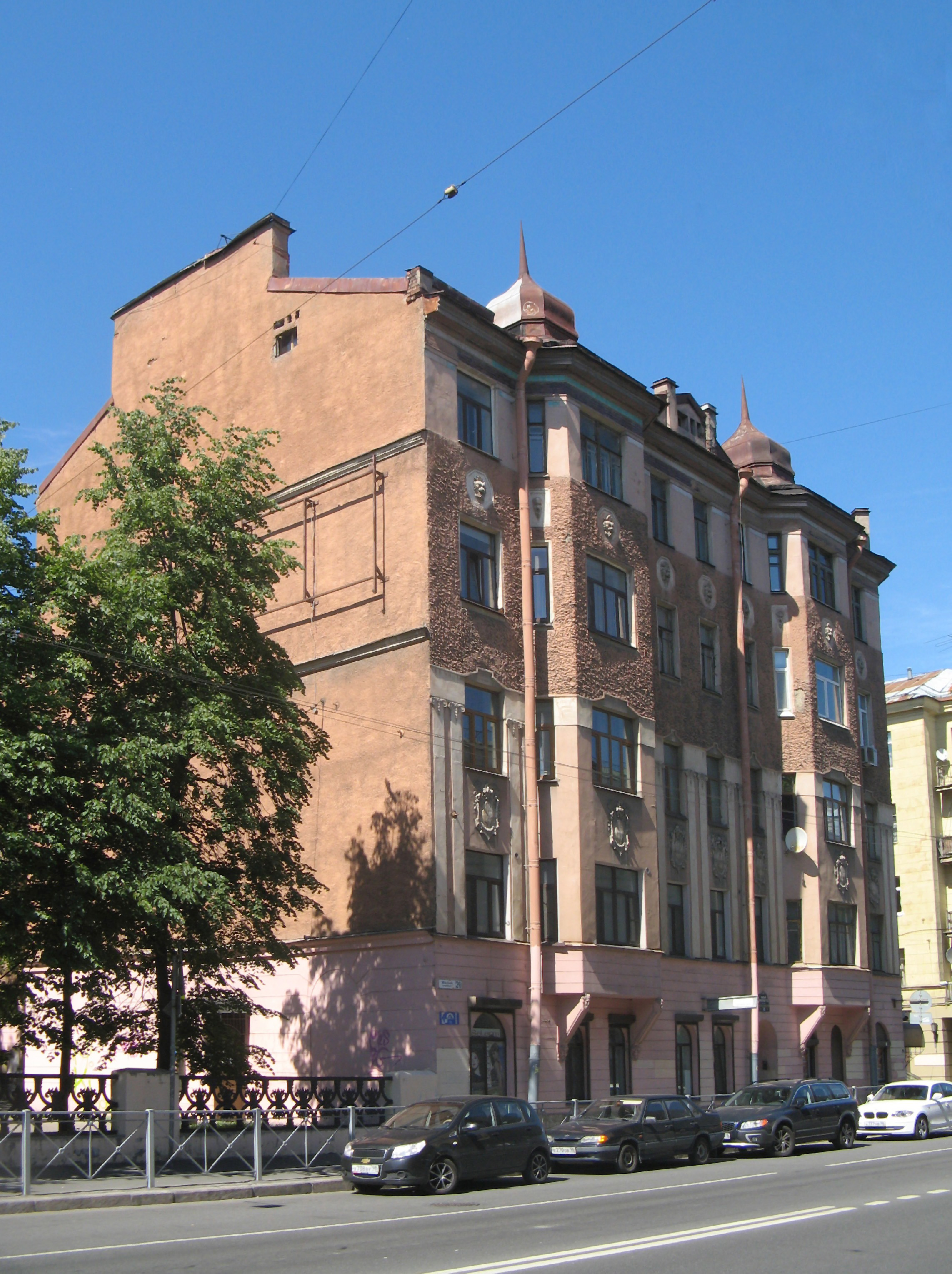 Санкт-Петербург, Малый проспект Петроградской стороны, дом 20/2